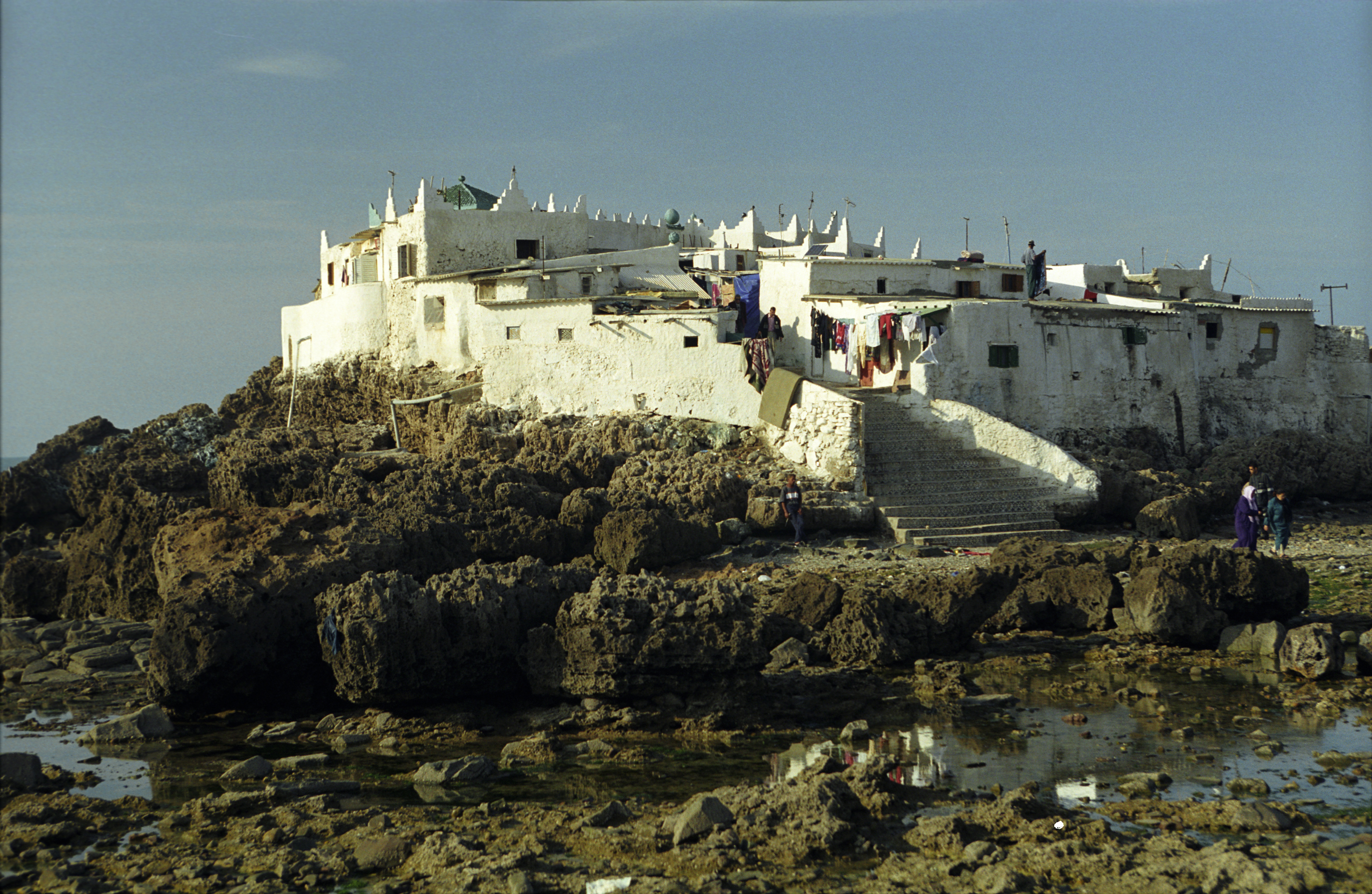 Sidi Abderrahman